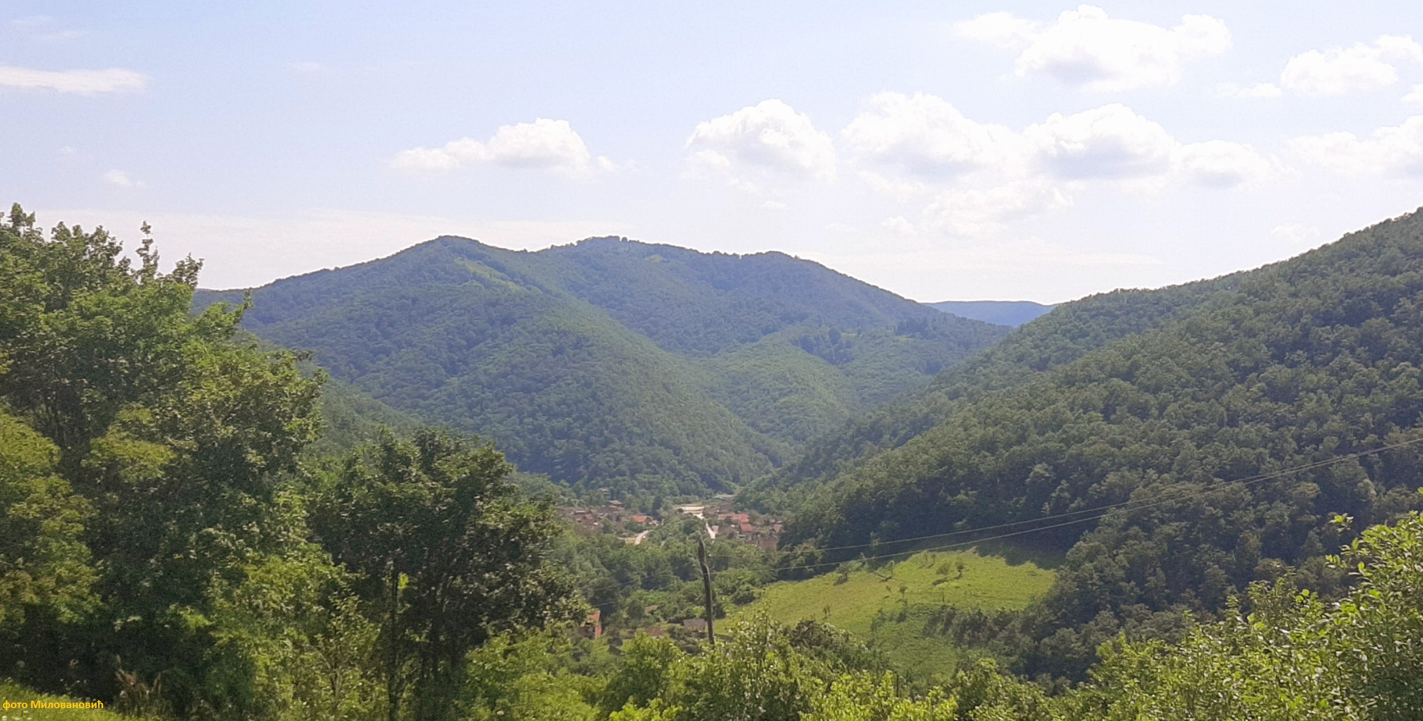 Село Бољетин (општина Мајданпек)